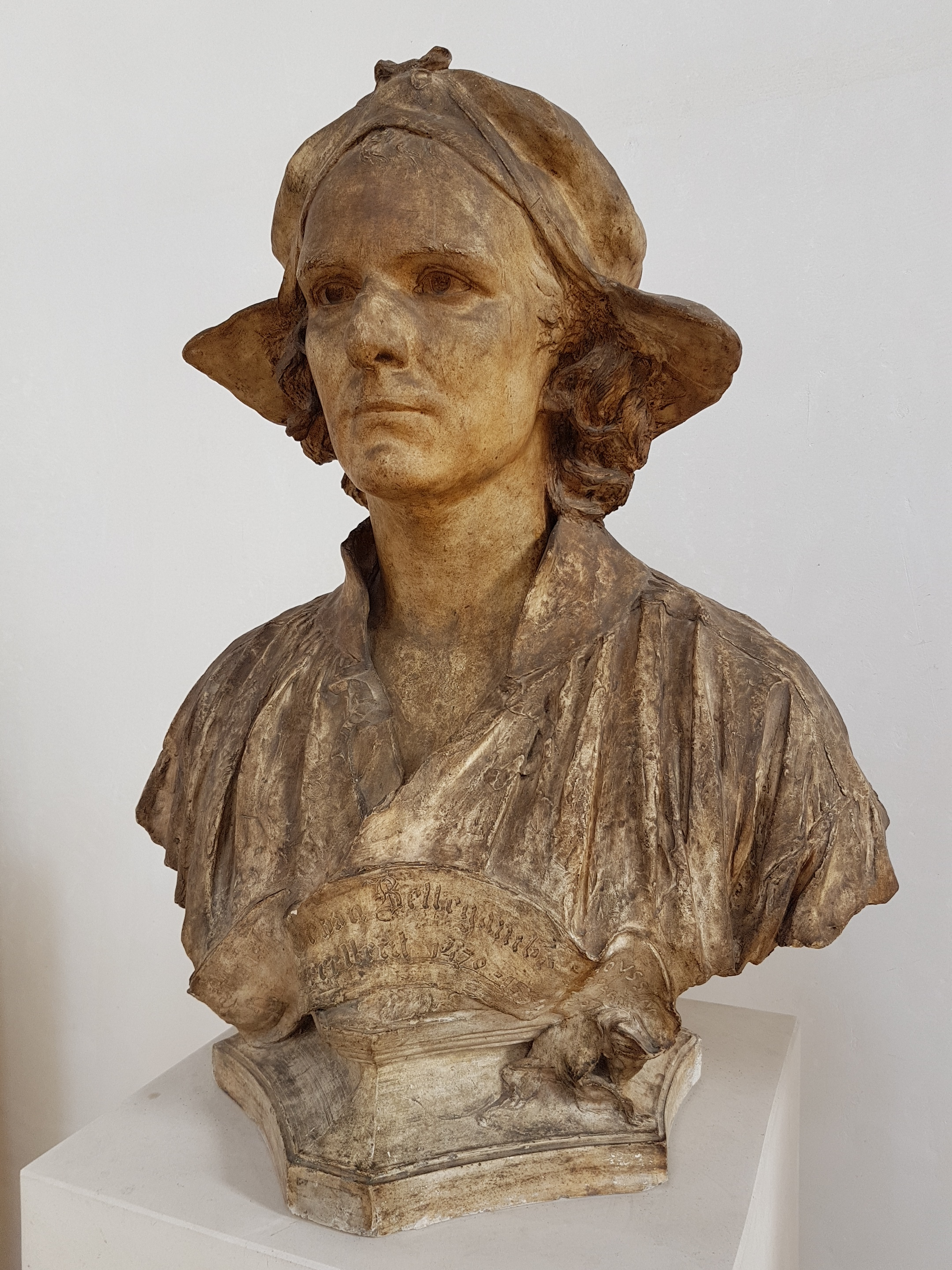 Buste du peintre Jehan Bellegambe, sculpté par Édouard Houssin (1847-1919). Plâtre patine bronze. Don de l'auteur en 1896. Musée de la Chartreuse (Douai), inv. 1998.